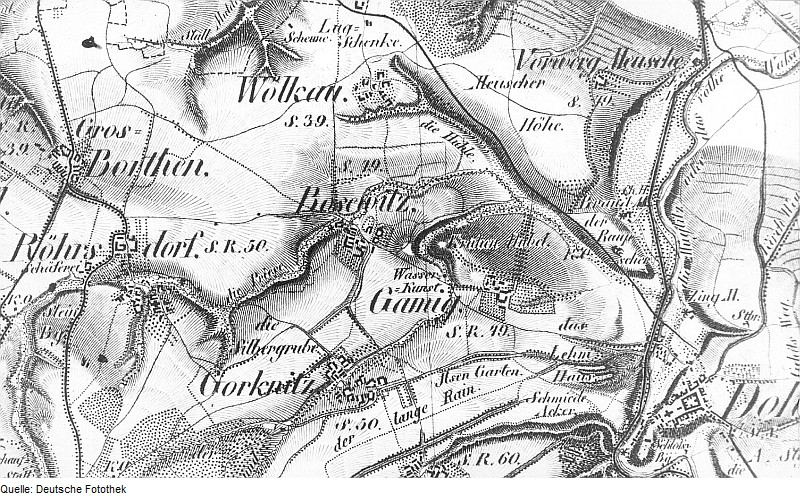 Original image description from the Deutsche Fotothek Dohna-Bosewitz und Gamig (Ortsteile). Oberreit, Sect. Dresden, 1821/22